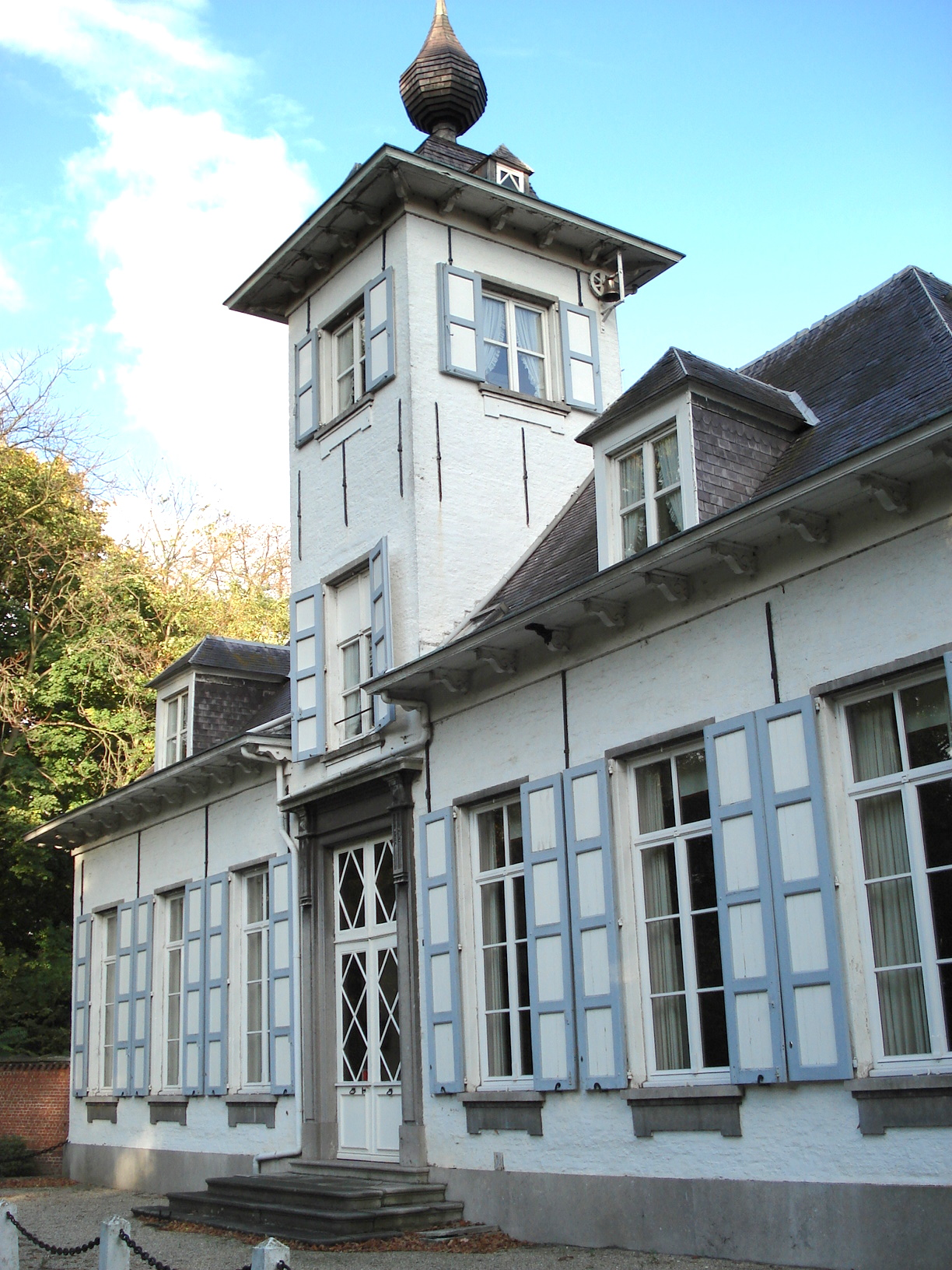 Berendrecht (Antwerpen): Sterrehof (ofte Hof van Delft, Hof Le Grelle-Van Delft, Reigershof), 18e eeuw, barok-rococo.